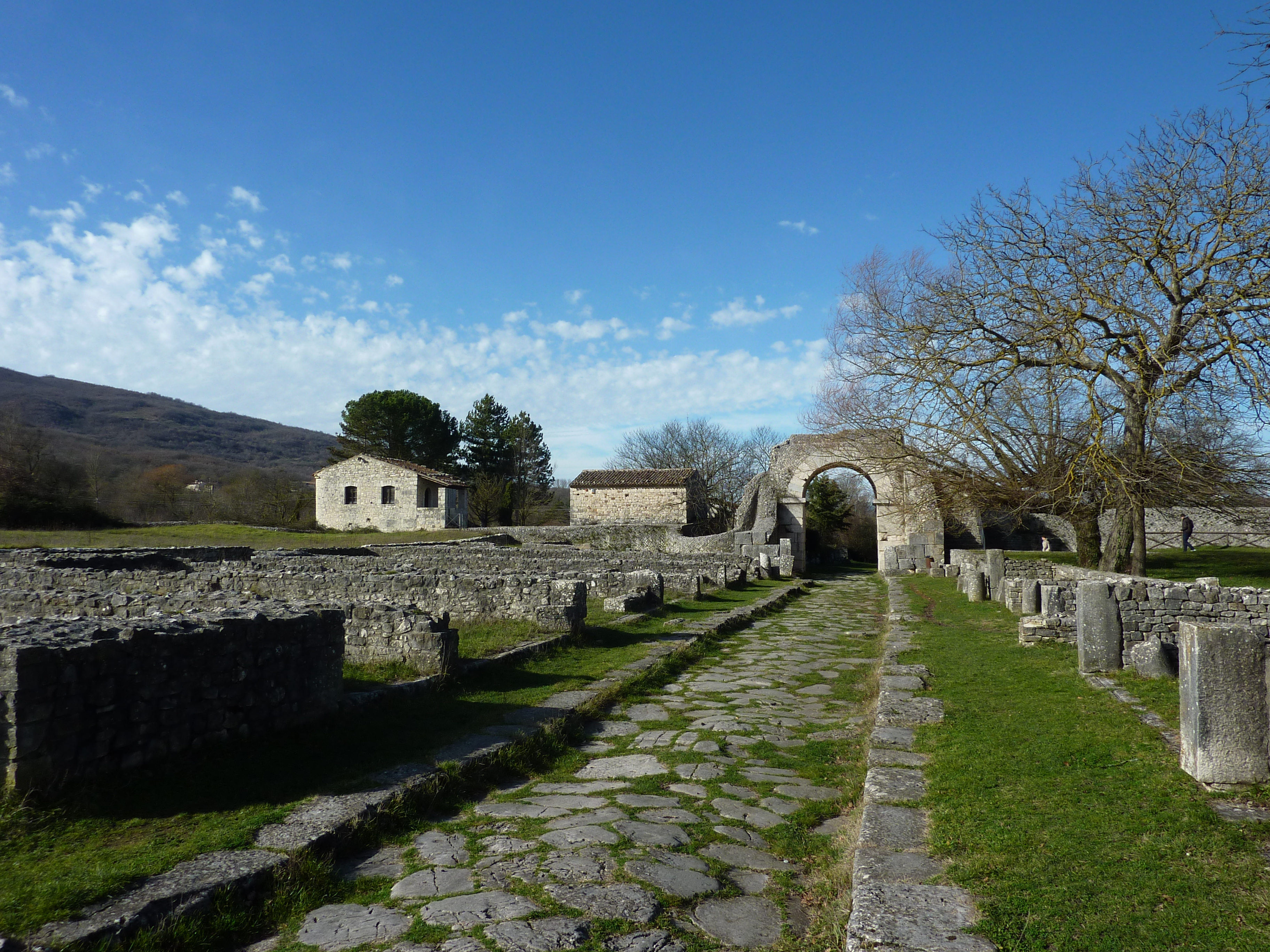 Altilia, Sepino - Porta Bojano